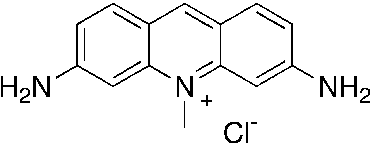 chemical structure of acriflavine (acriflavin)